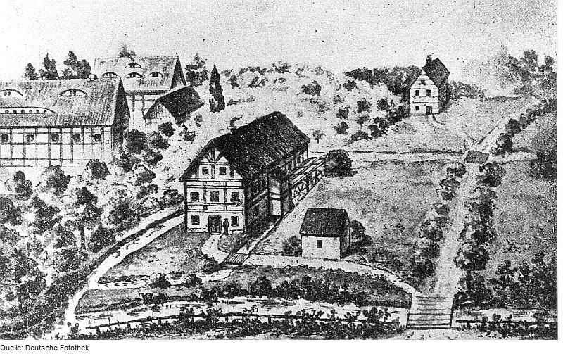 Original image description from the Deutsche Fotothek Dresden-Eschdorf. Obere Mühle, Geburtshaus von Traugott Bienert, aus: Meiche 1927